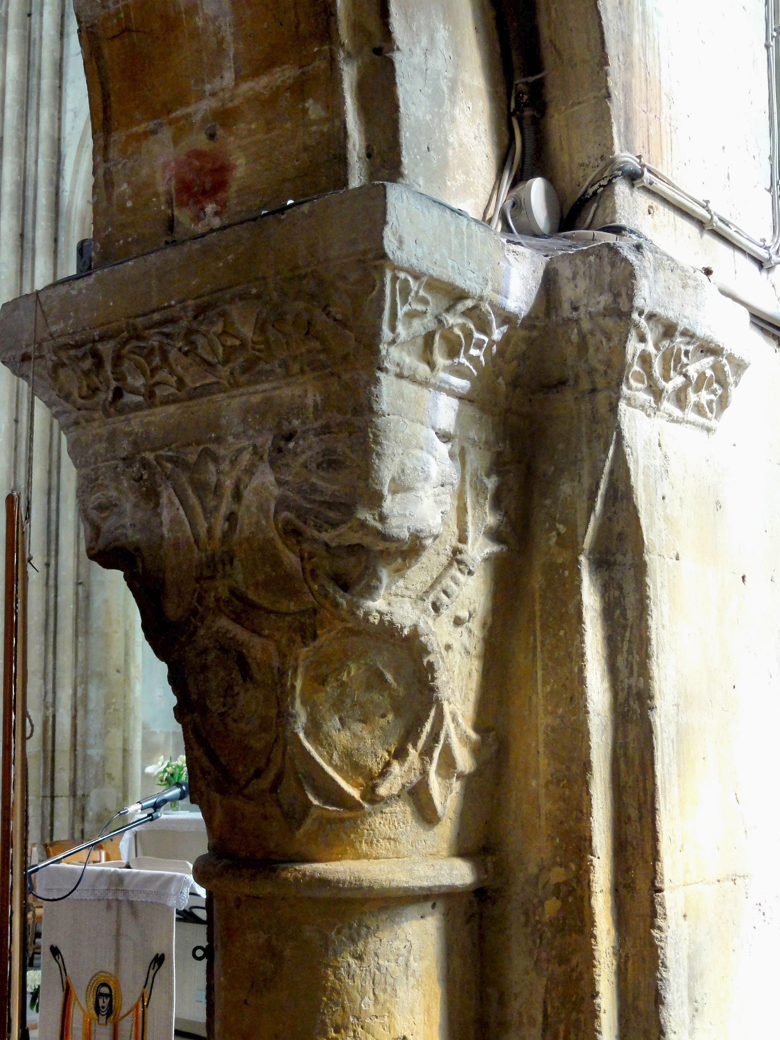 Chapiteau de la 6e grande arcade du sud, côté est.